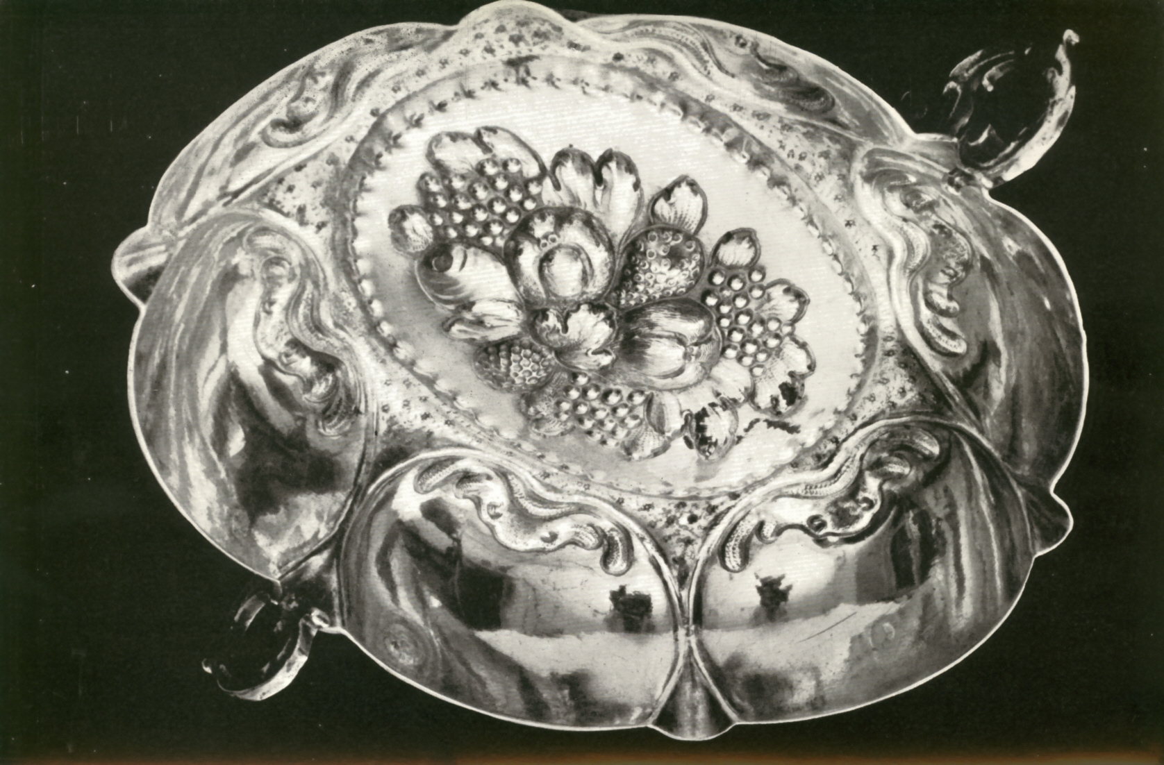 Etrogschale, Augsburg um 1680, Silber vergoldet, 14,5 x 16 cm (Prag, Jüdisches Museum, Inv. Nr. 173.826)